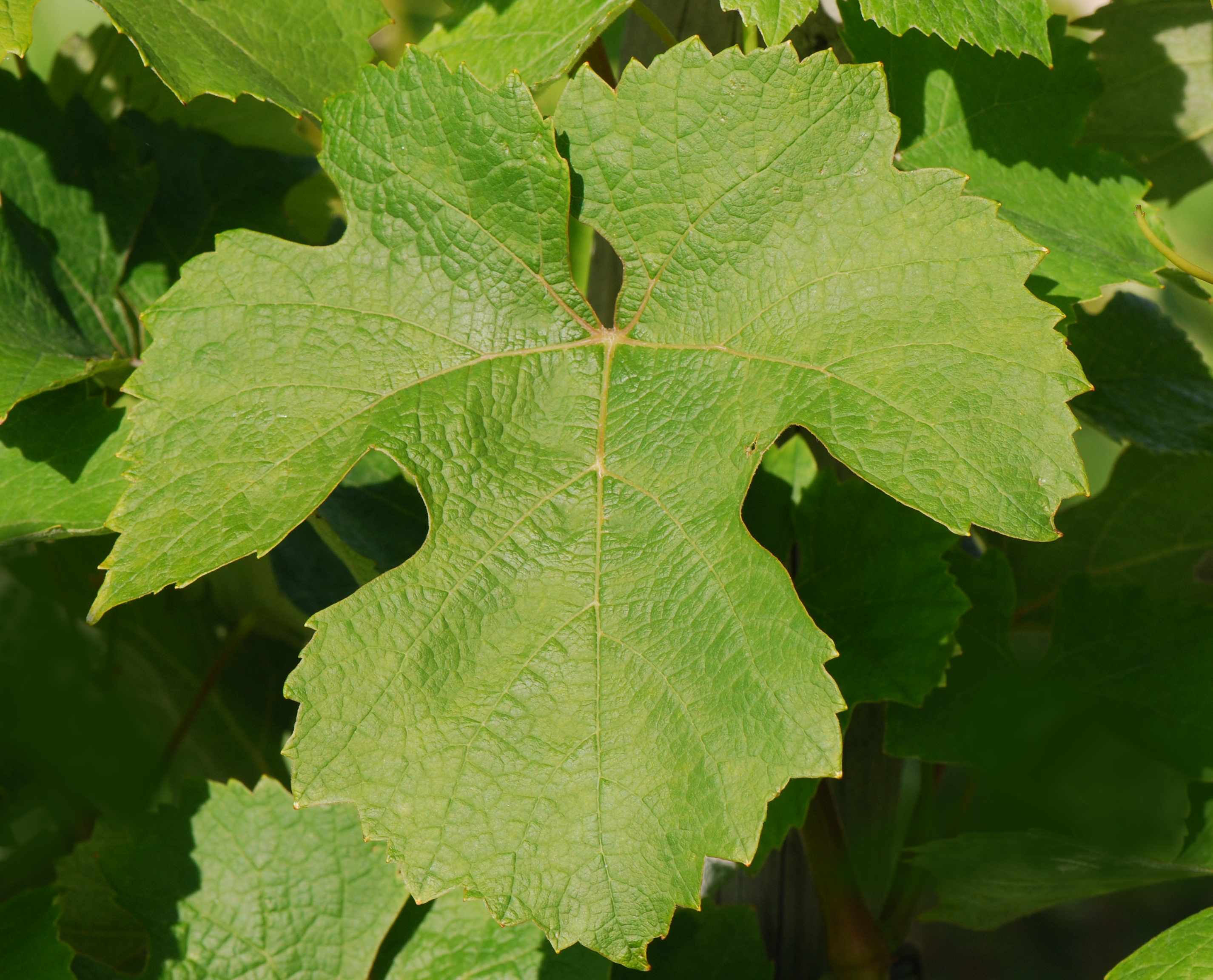 Feuille de Folle-blanche, Conservatoire du Vignoble Charentais, Cherves